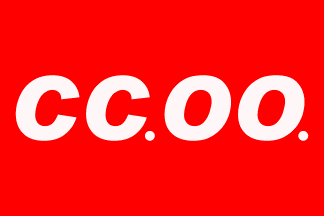 Logo horizontal del sindicato Comisiones Obreras vigente hasta el 24 de abril de 2007.